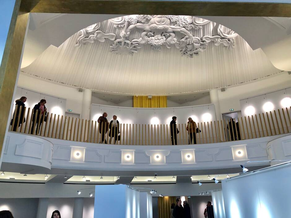 Le Comoedia devient en 2019 espace d'art contemporain. Le plafond, réalisé au début des années 1950 par l'artiste Jean-René Debarre.